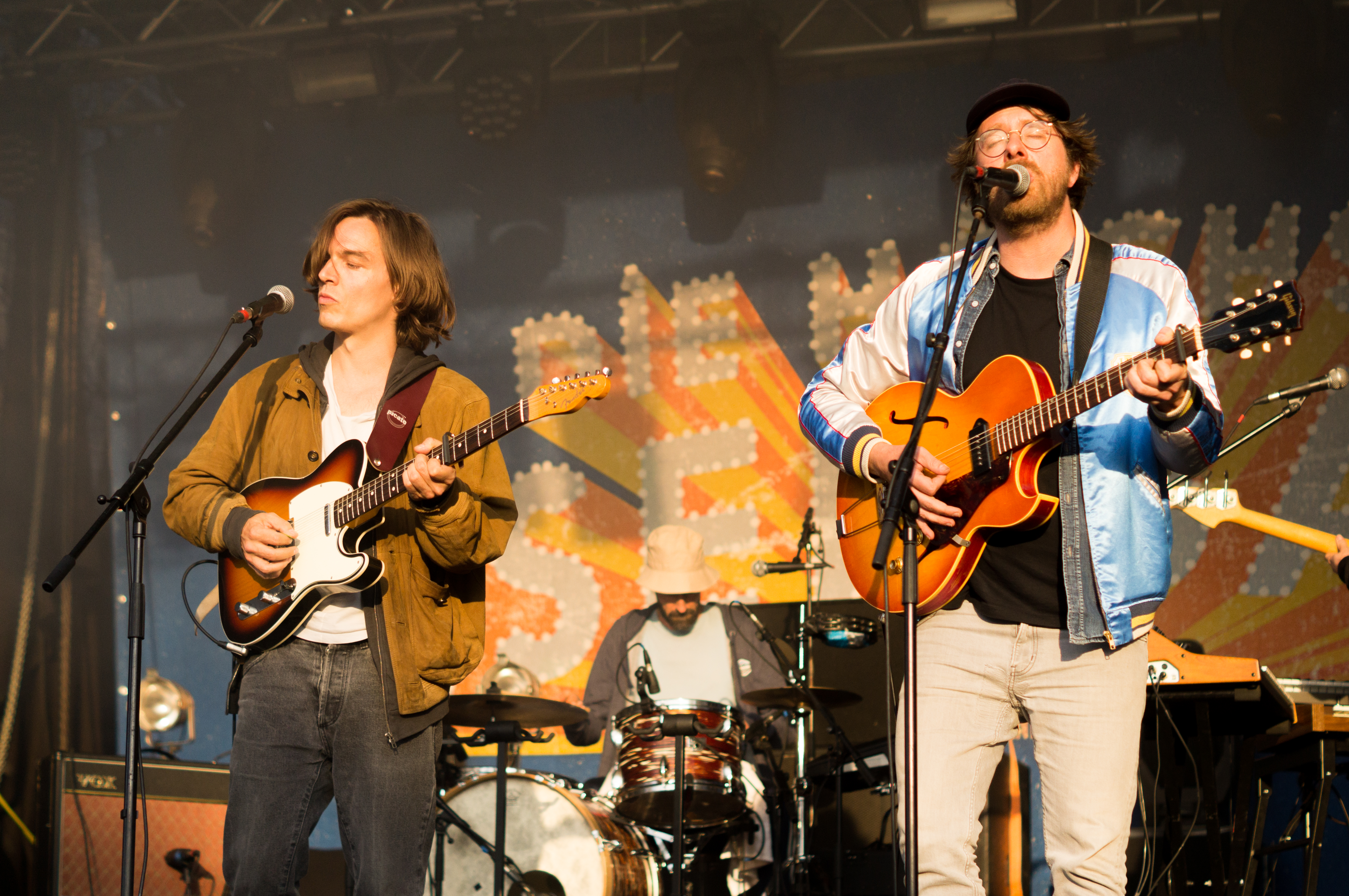 Moritz Krämer und Francesco Wilking mit der Band Die Höchste Eisenbahn auf dem Kosmonaut Festival 2017.